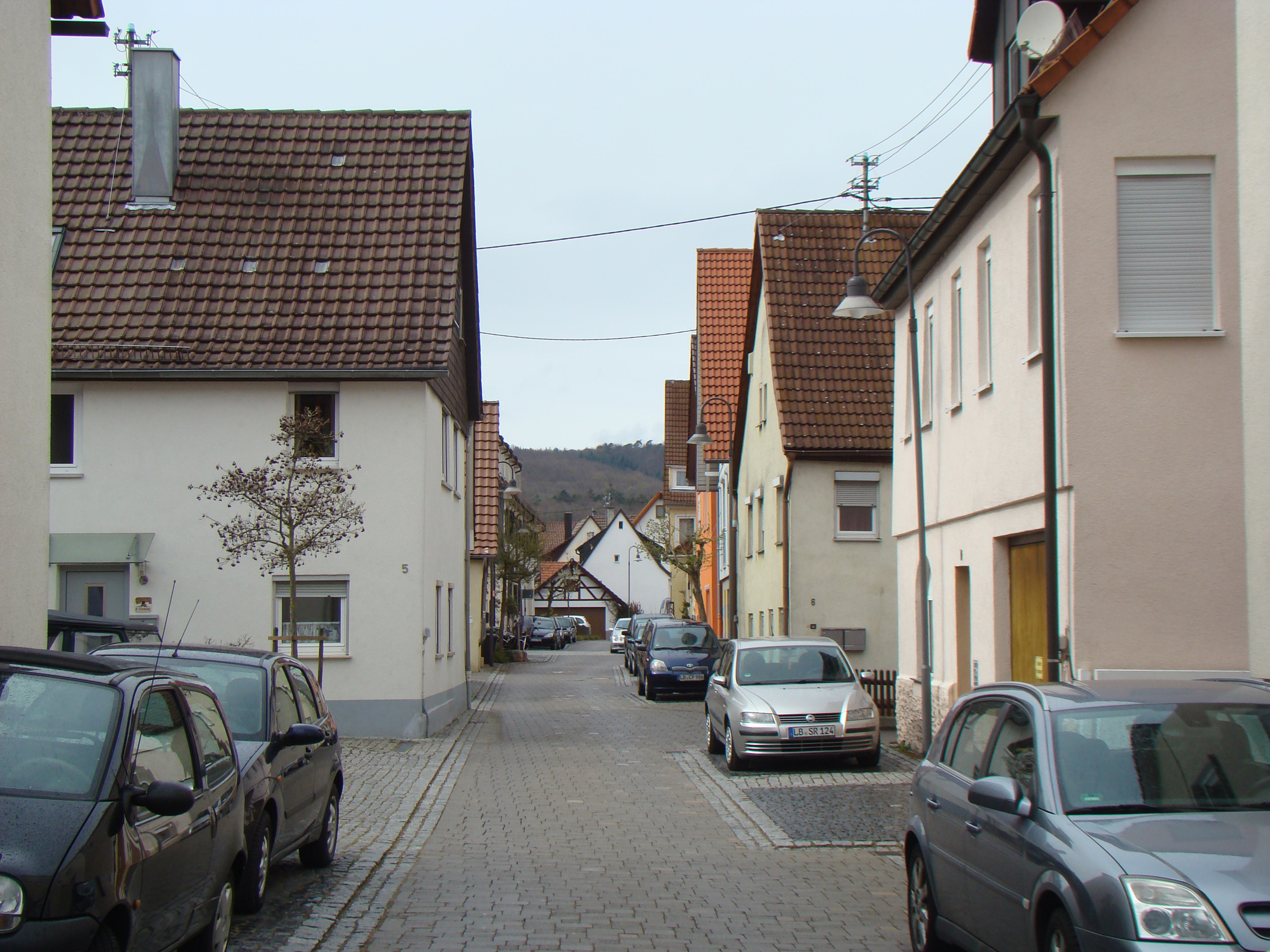 Ehem. Judengasse in Freudental (Lkr. LB)